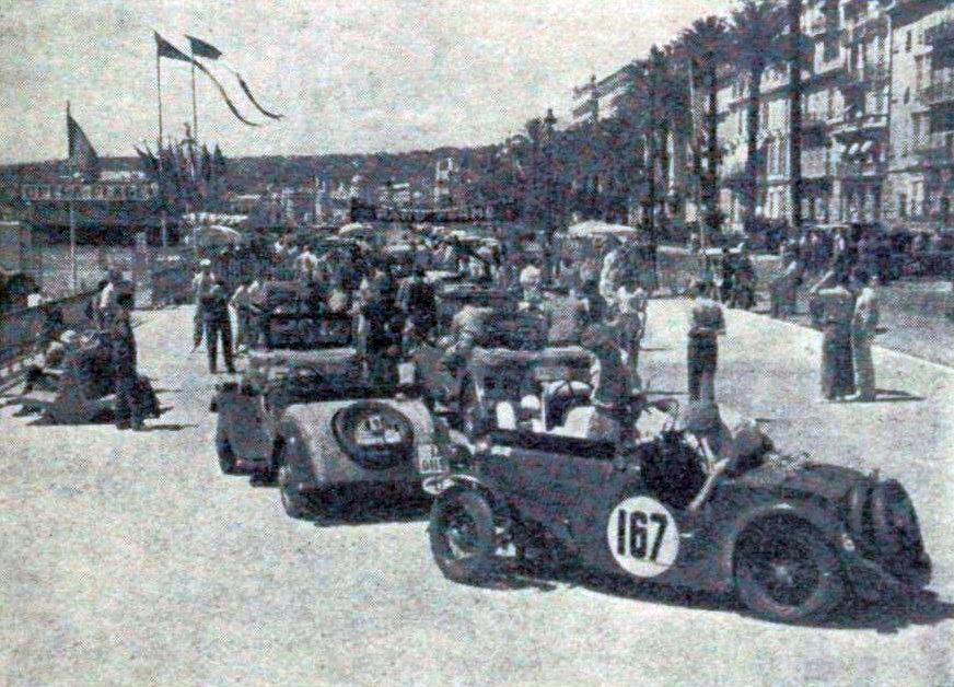 Le parc fermé à Nice de la Coupe internationale des Alpes 1934.